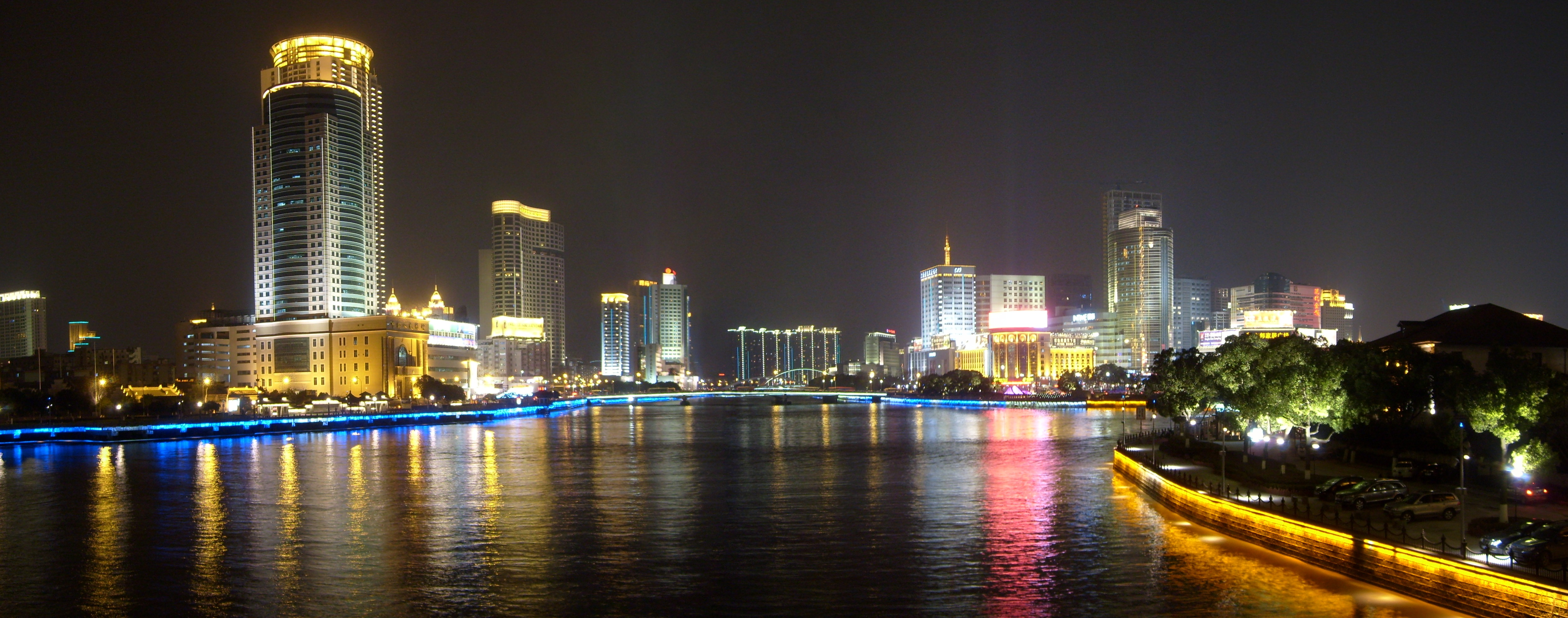 宁波夜景